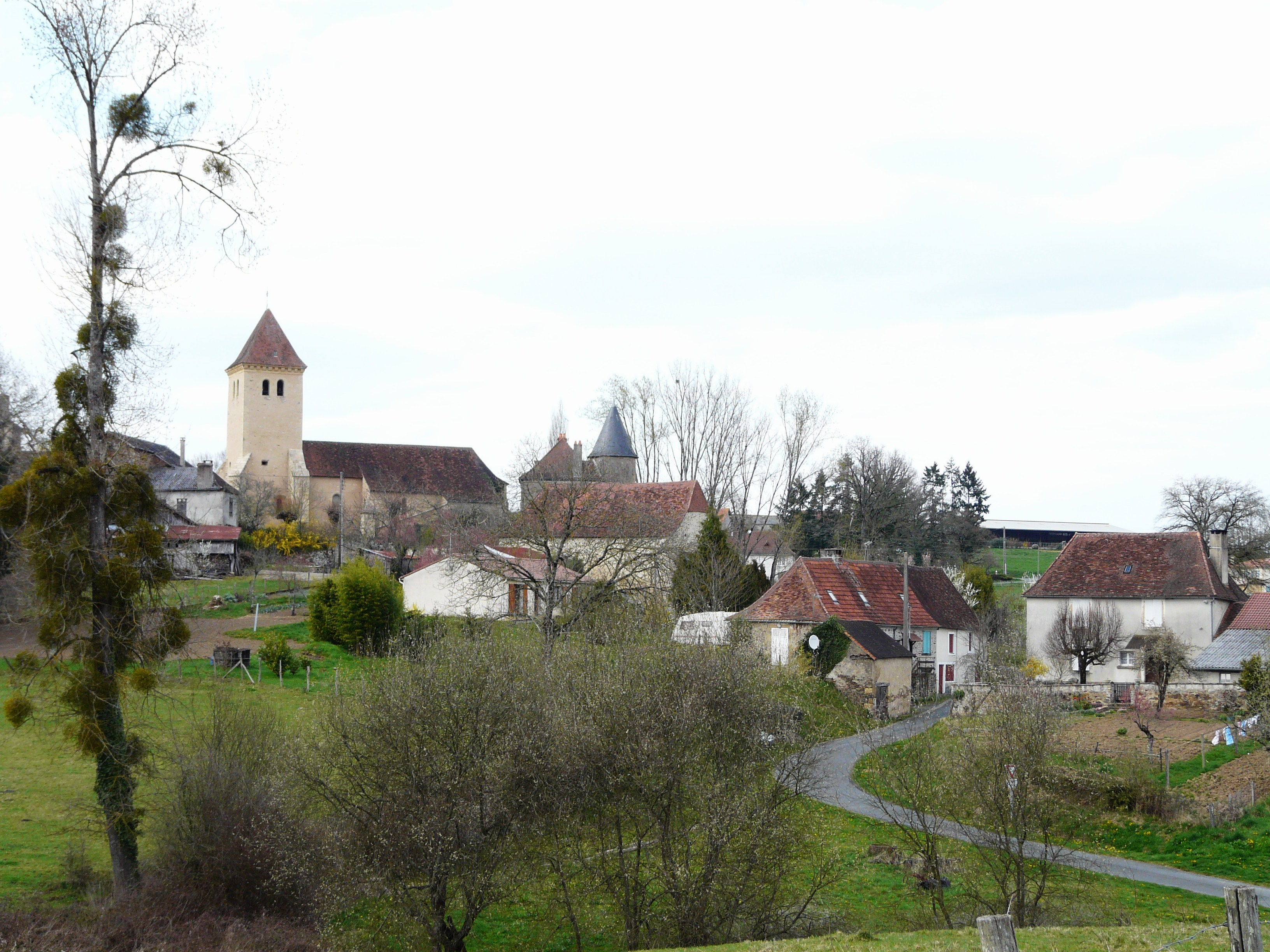 Le bourg de Sarrazac, Dordogne, France